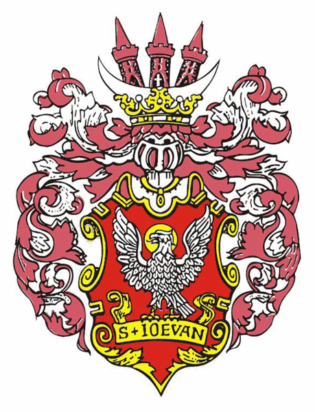 Herb Miasta Oleśnica